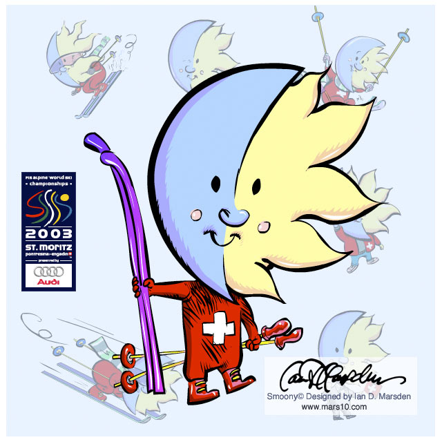 Smoony, das offizielle Maskottchen der Ski-WM 2003 in St. Moritz von Ian D. Marsden